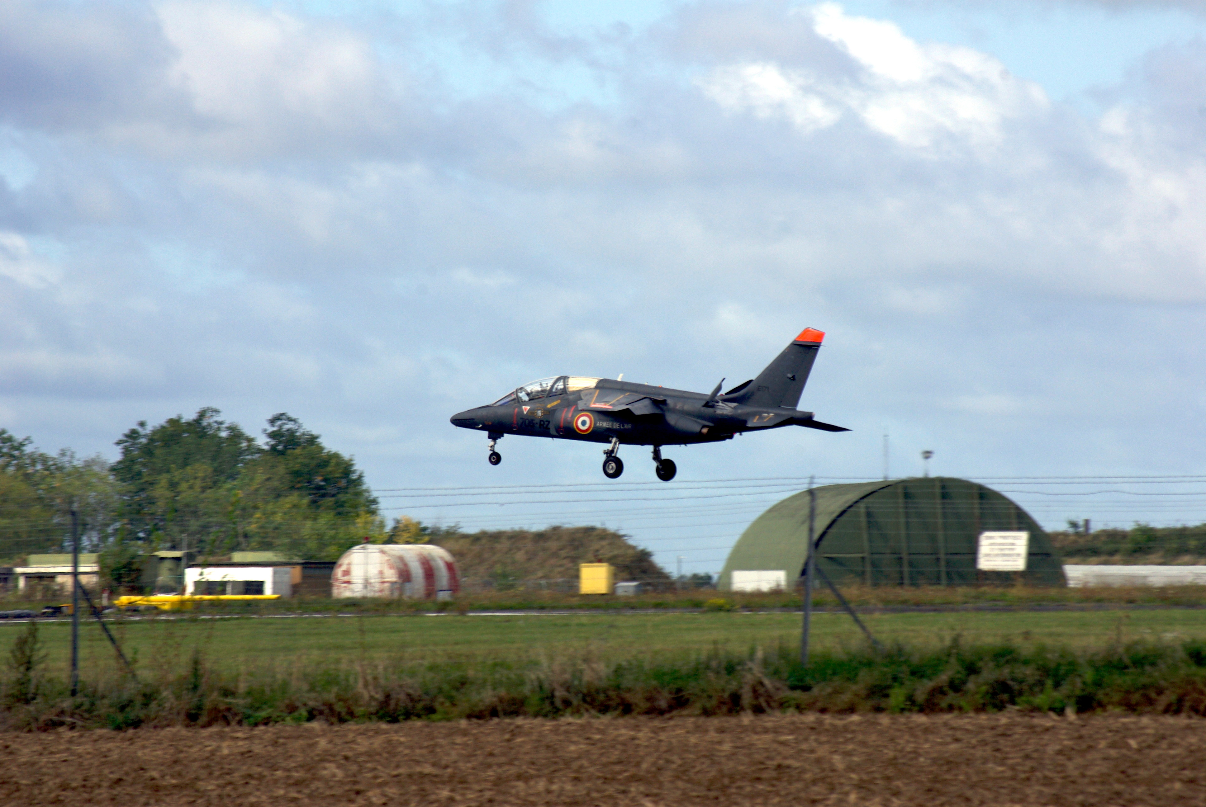 Alphajet 705-RZ (E171) à l'atterrissage sur la base 705 Tours.